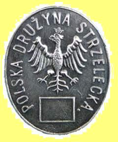 Replika odznaki Polskich Drużyn Strzeleckich z 1913. Posrebrzona i oksydowana, z tyłu posiada słupek i nakrętkę. Wymiary 30 x 38 mm.